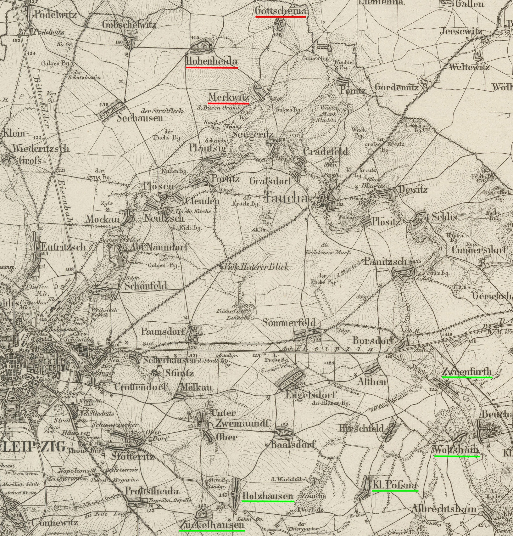 Die Universitätsdörfer der Universität Leipzig auf einer Karte von 1863. Alte Universitätsdörfer rot, neue grün unterstrichen.